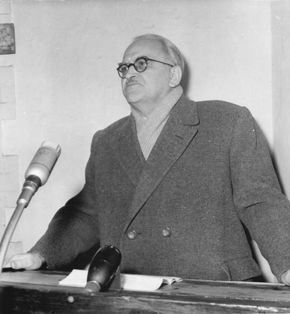 Title: Berlin, Fluchttunnel Wollankstraße, Pressekonferenz People in the image: Kramer, Erwin Dr.: Minister für Verkehrswesen, DDR Factual corrections and alternative descriptions are encouraged separately from the original description. Additionally errors can be reported at this page to inform the Bundesarchiv. Original historic description: Zentralbild-Junge-1962 Gefährliche Provokation an der Staatsgrenze der DDR-Durch Agentenschleuse Eisenbahnverkehr aufs äusserste gefährdet. Ein neues eklatantes Beispiel für die friedensgefährdende Rolle der Westberliner Frontstadt-Politik ist am 1.2.1962 auf einer internationalen Pressekonferenz in Berlin enthüllt worden. Vor in- und ausländischen Journalisten, darunter Vertretern westdeutscher Zeitungen informierte der Minister für Verkehrswesen der DDR, Erwin Kramer, auf dem Gelände des S-Bahnhofes Wollankestrasse über die ungeheuerliche Tatsache, dass Westberliner Banditen unter gröbster Verletzung der Staatsgrenze der DDR durch die Gewölbe dieses Bahnhofes ein Stollensystem vorgetrieben haben. Durch die Anlage dieses Stollensystems sollten Agenten und Diversanten von Westberlin in das Gebiet der DDR eingeschleust werden. UBz: Erwin Kramer bei seinen Ausführungen auf der Pressekonferenz.